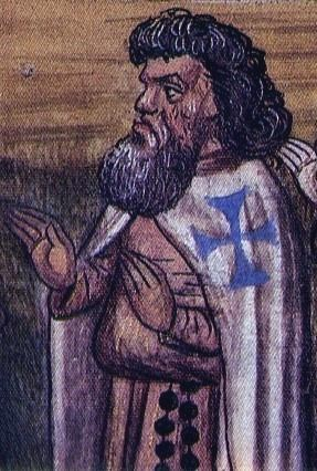 Hugues III, comte de Bouville. Miniature du XVe siècle.